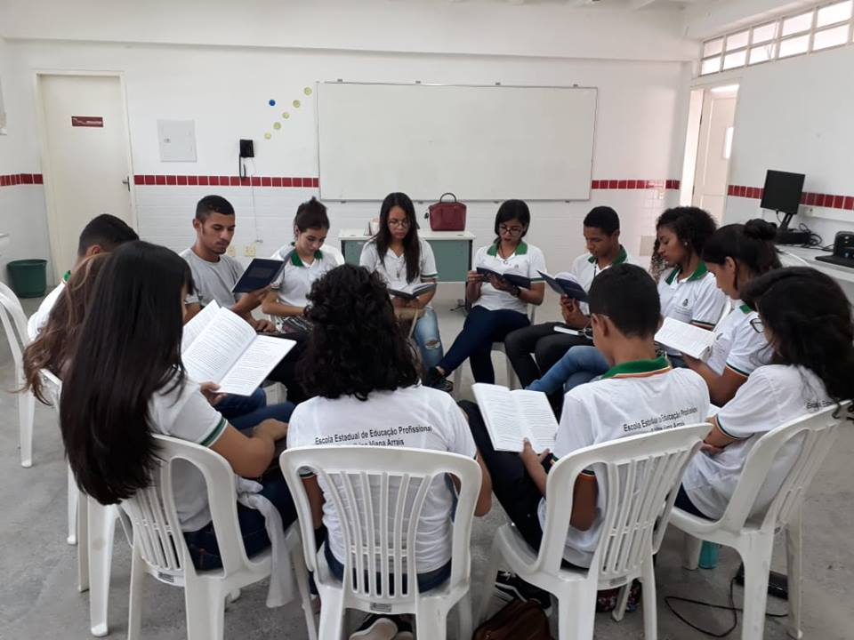 Alunos participando de leitura pelo projeto Círculos de Leitura, do Instituto Fernand Braudel, na EEEP Balbina, no Ceará (Brasil).